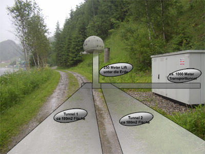 earthDATAsafe Bunkerkomplex unter der Erde. Seitenansicht